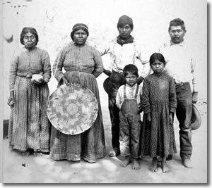 представители на племето йокути